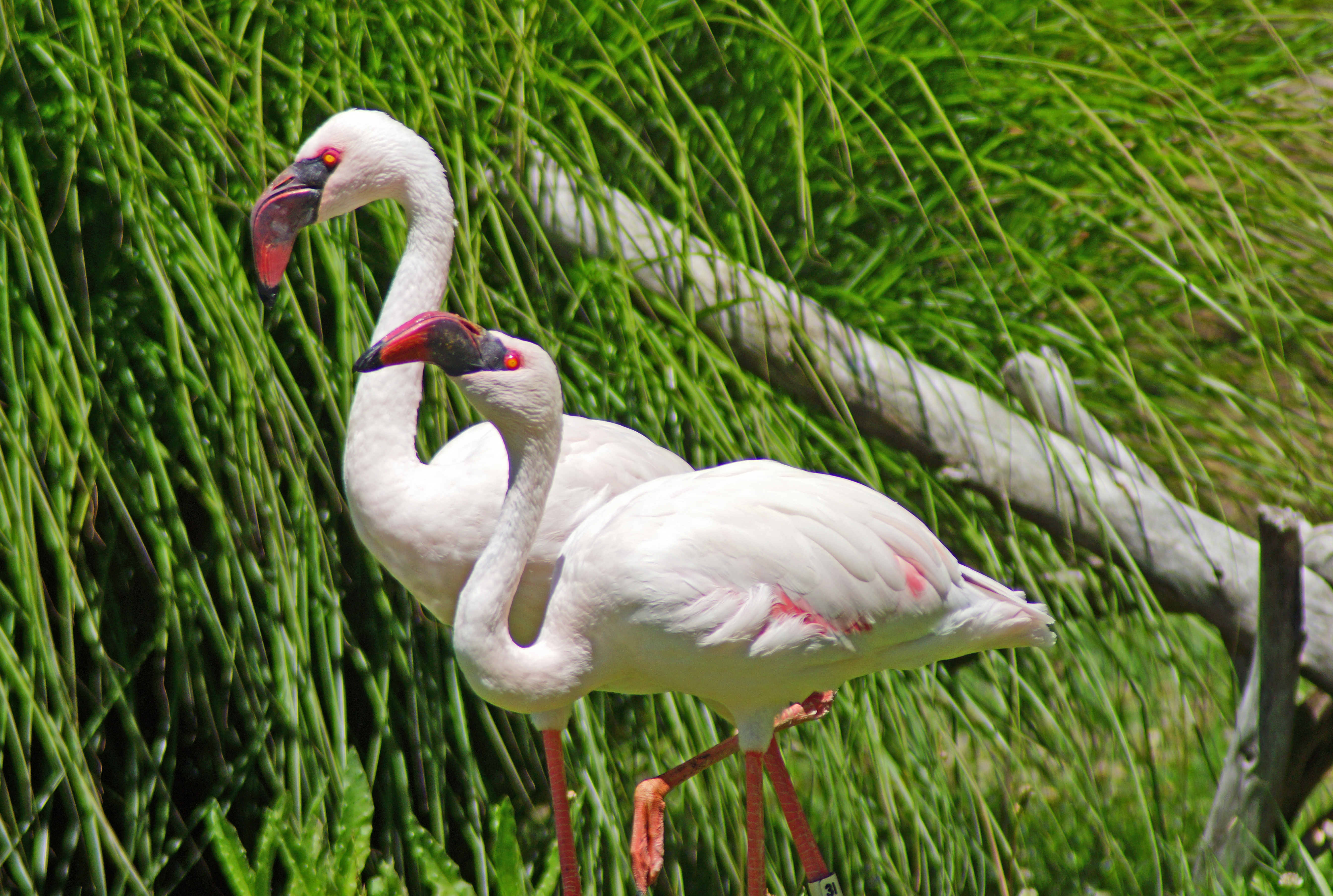 2012-06-09 Oakland Zoo 006